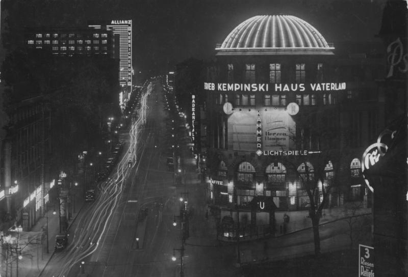 Berlin bei Nacht! Blick vom Potsdamerplatz in Berlin auf die im nächtlichen Lichterglanz erstrahlende Stresemannstrasse. Im Vordergrund, dass in der ganzen Welt bekannte Vergnügungs-Etablissement "Haus Vaterland", im Hintergrund links der Hochbau des imposanten Europahauses mit seiner riesigen Lichtreklame.